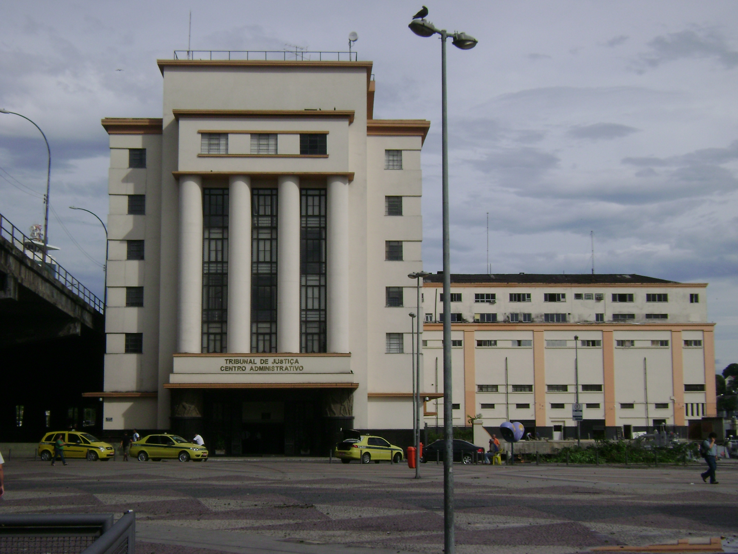 Tribunal de justiça na cidade de Rio de Janeiro, Brasil.